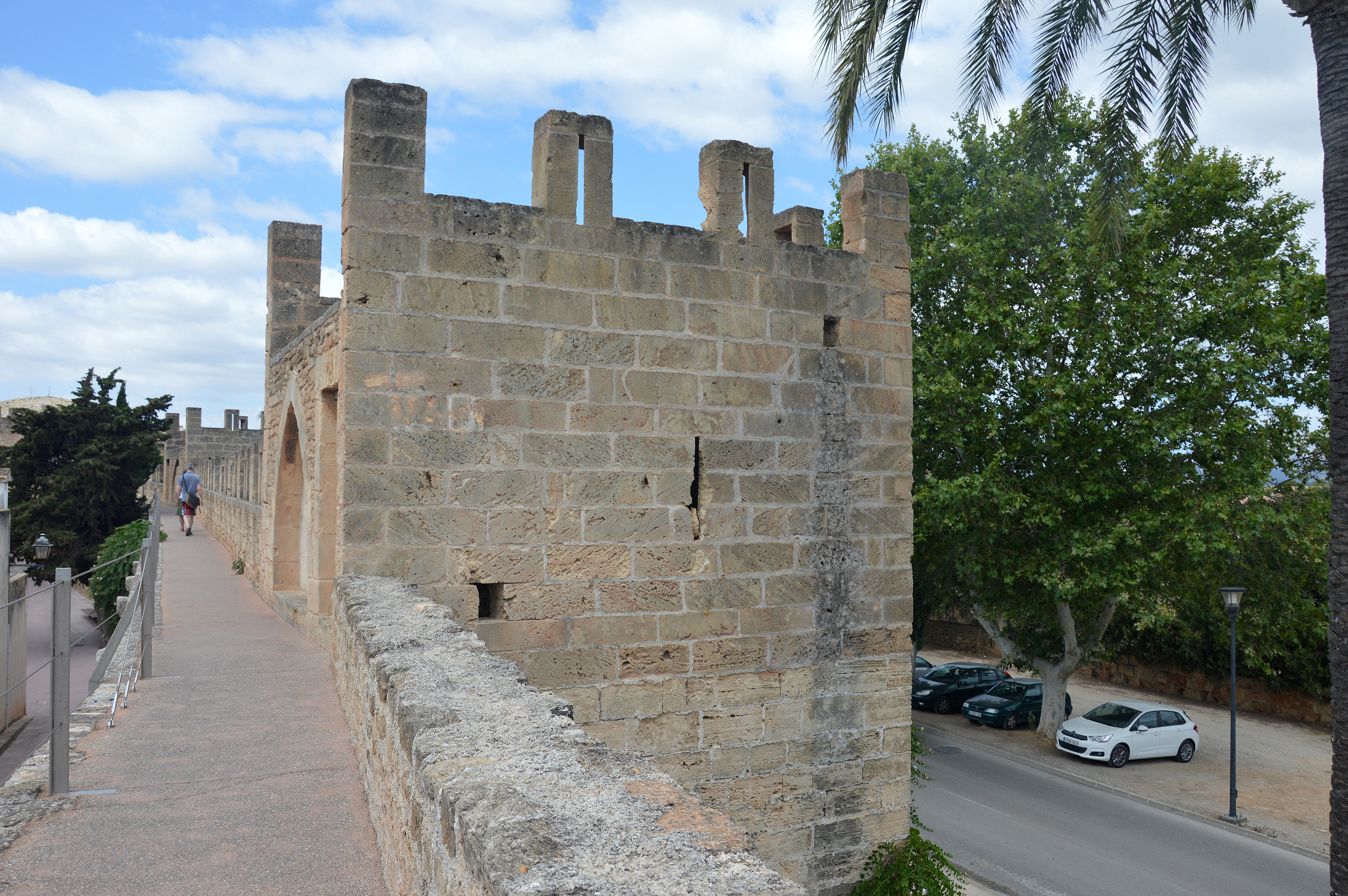 Stadtbefestigung Alcudia